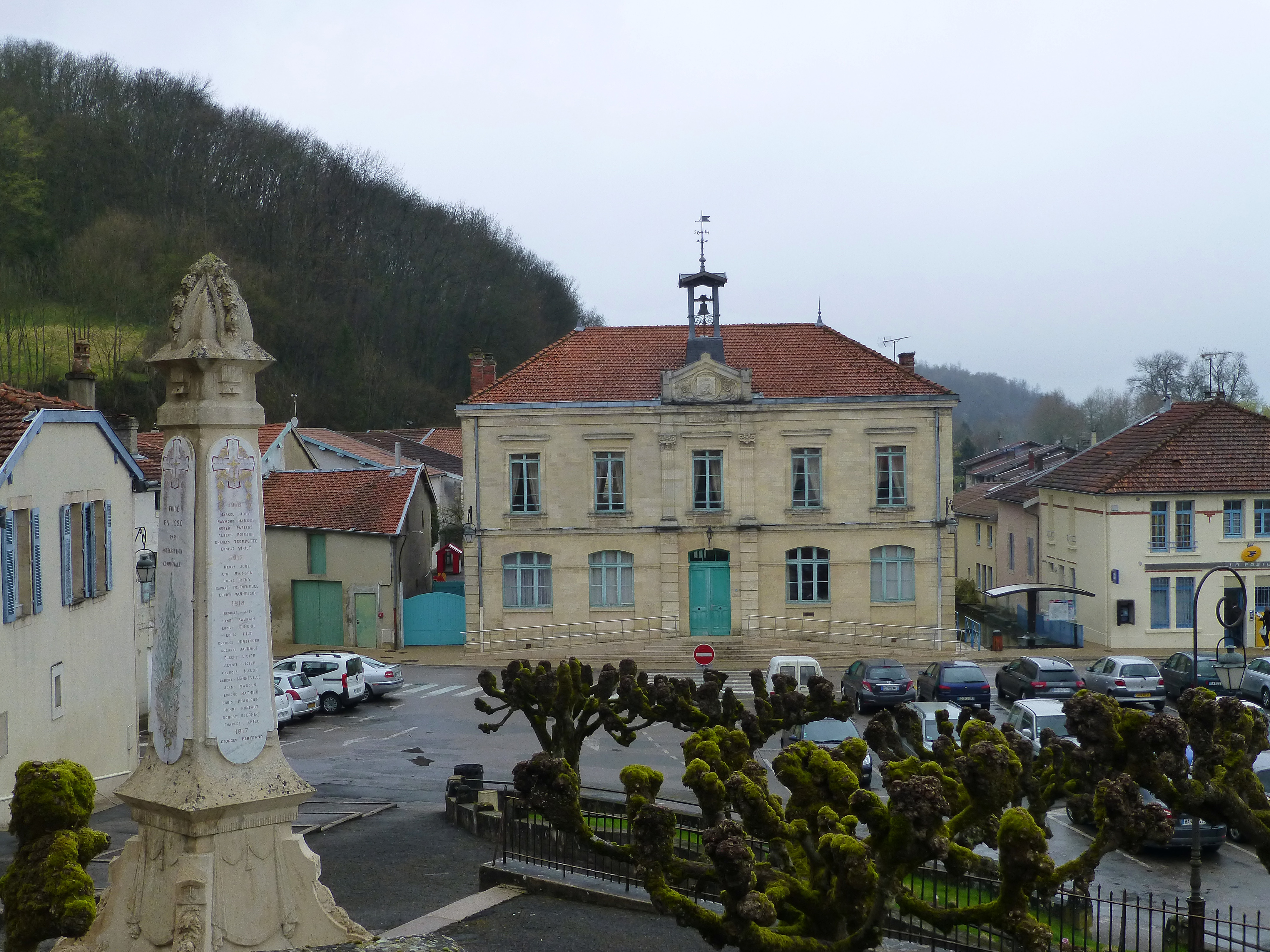 Place de la Mairie à Fains-les-Sources (Fains-Véel, Meuse)